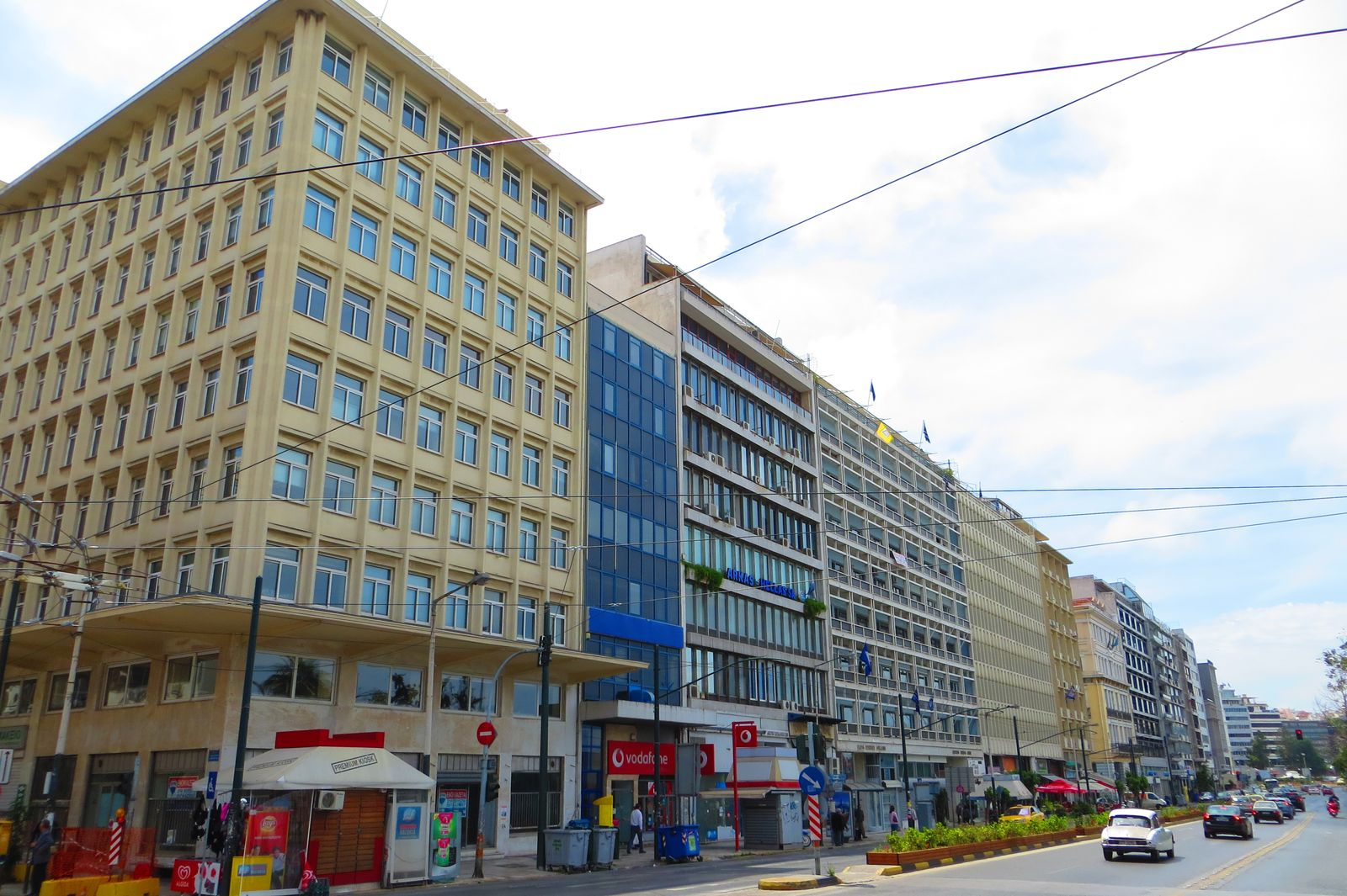 Akti Miaouli